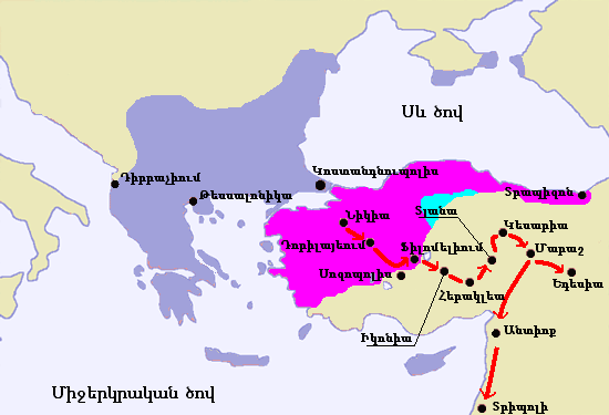 Բյուզանդիան Առաջին խաչակրաց արշավանքից հետո